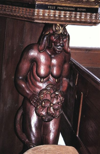 Vejlø Kirke i Danmark. Prædikestol